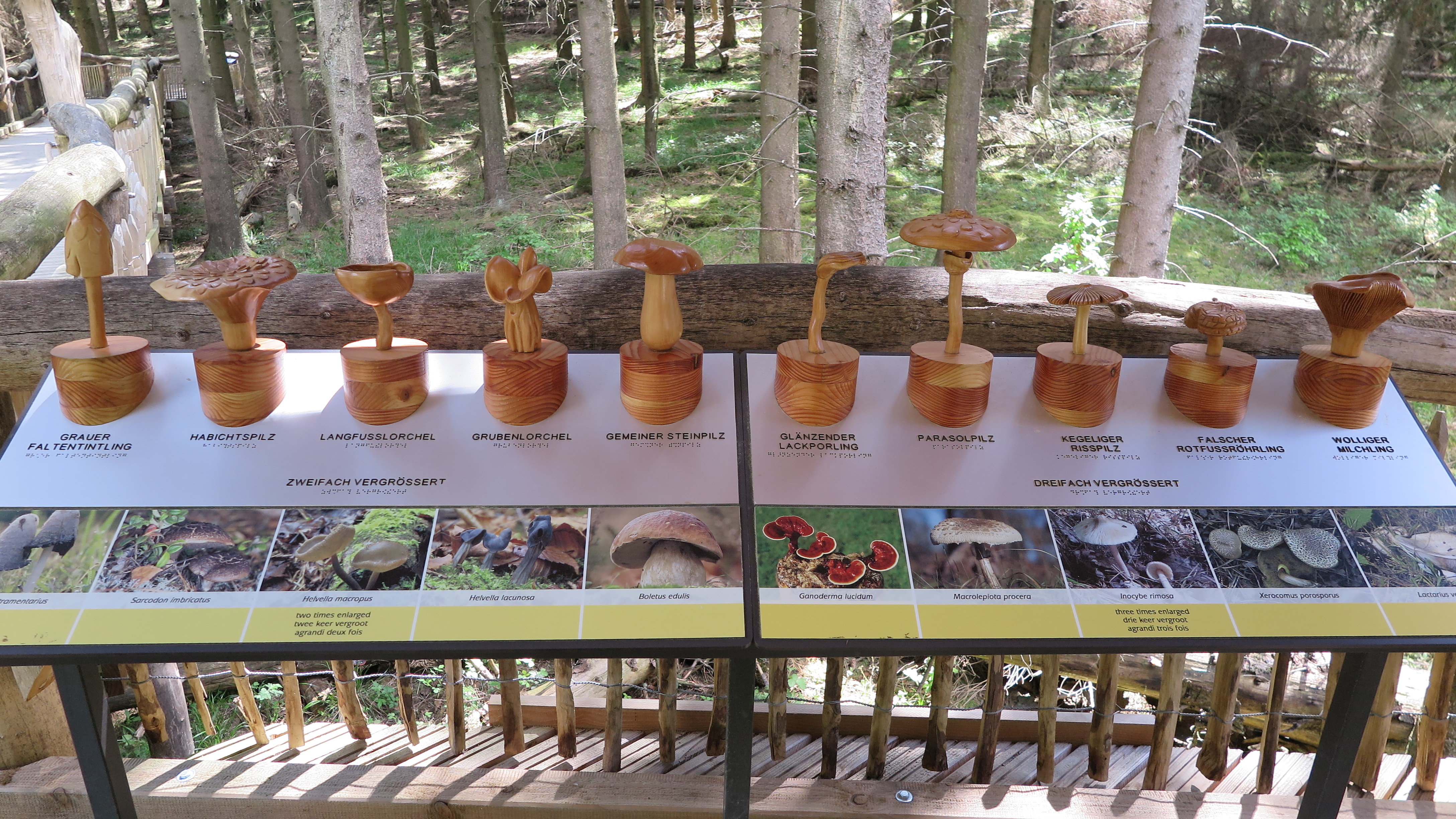 Hinweistafel mit Pilzen am „Wilden Weg“ im barrierefreien Naturerlebnisraum „Wilder Kermeter“ im Nationalpark Eifel. Anhand der Pilzmodelle können auch Blinde die Form der Pilze erfahren. Zusätzlich gibt es eine Beschriftung in der Blindenschrift Braille.